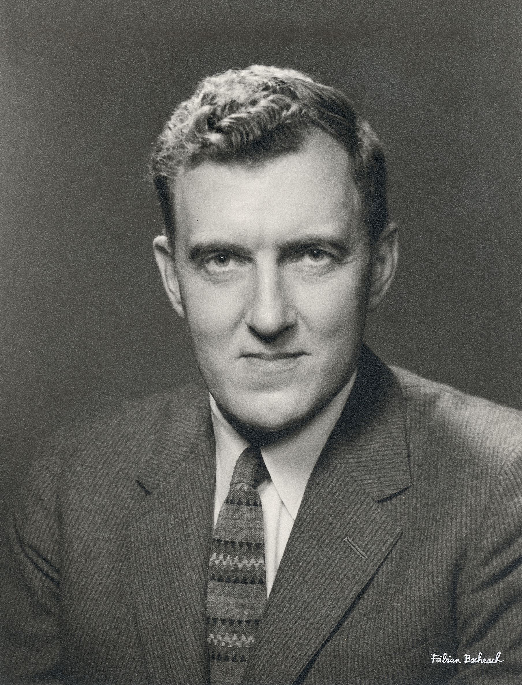 Maine Gov. Edmund Muskie